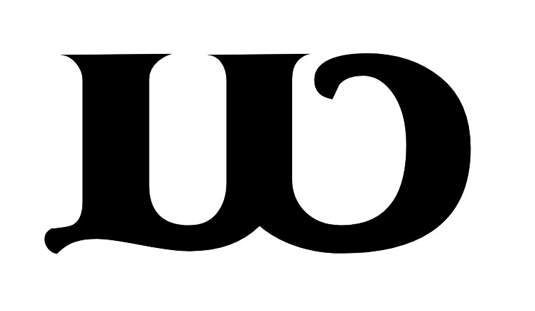 ധ മലയാളം അക്ഷരം